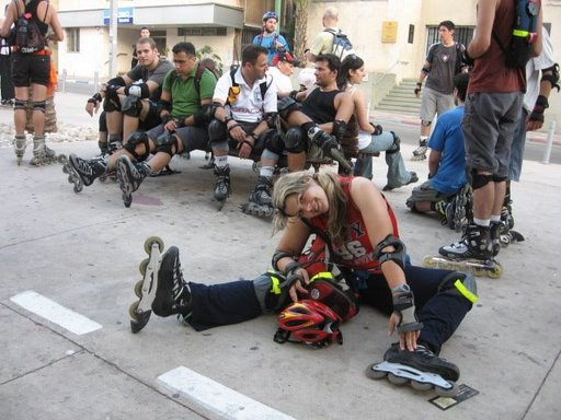 Skating groups in Israel